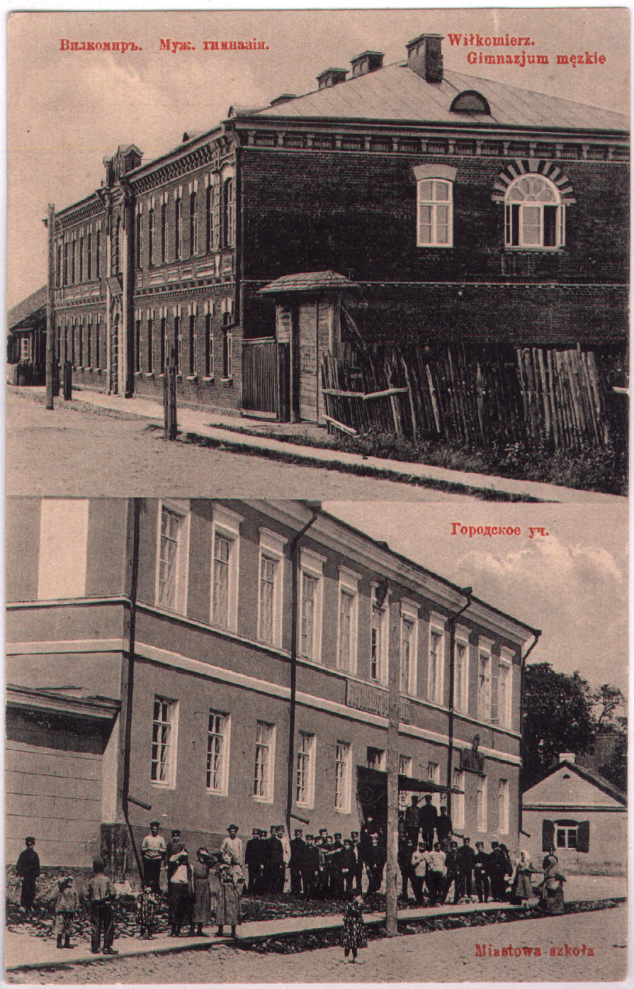 Wiłkomierz - synagoga i szkoła miejska